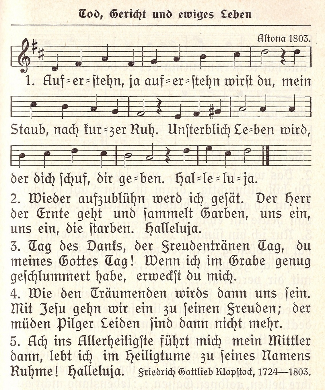 Auferstehn, ja auferstehn, Evangelisches Gesangbuch für Rheinland und Westfalen (1929) Nr. 338